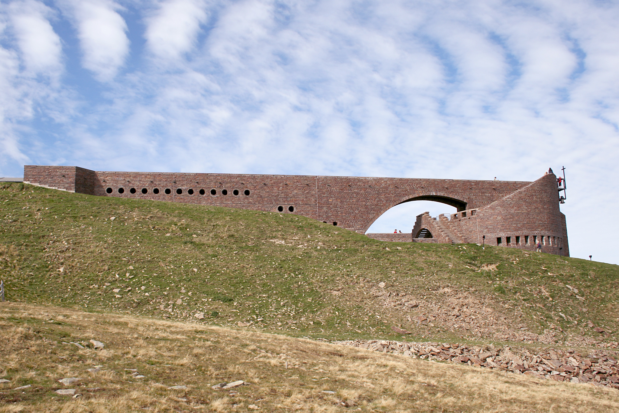 Cappella di Santa Maria degli Angeli, Alpe Foppa, Switzerland